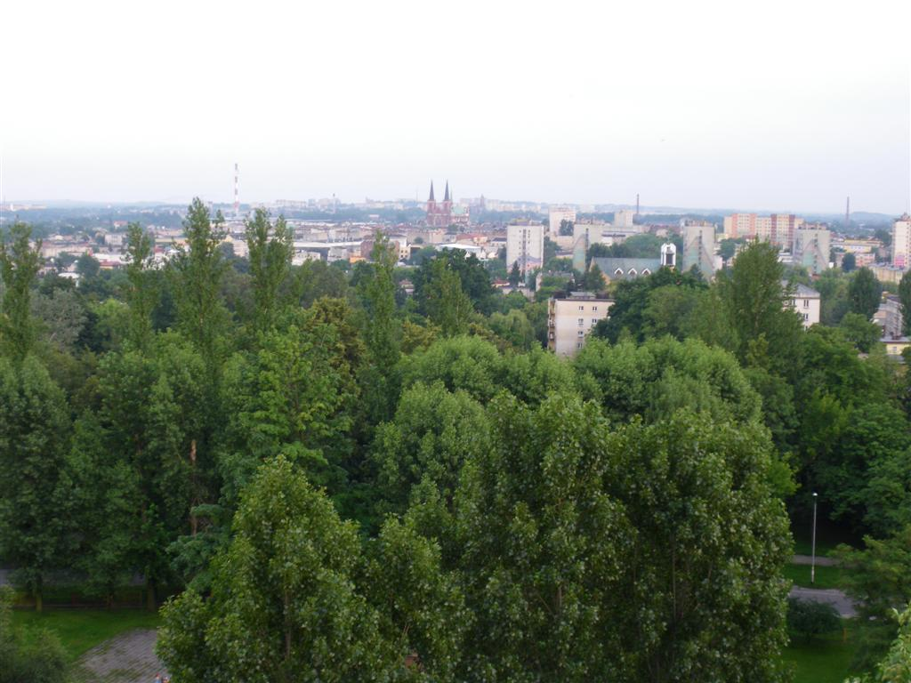 Tysiąclecie ("Zielone" osiedle) w Częstochowie. w oddali śródmieście (za tymi wieżowcami w kolorach tęczy).